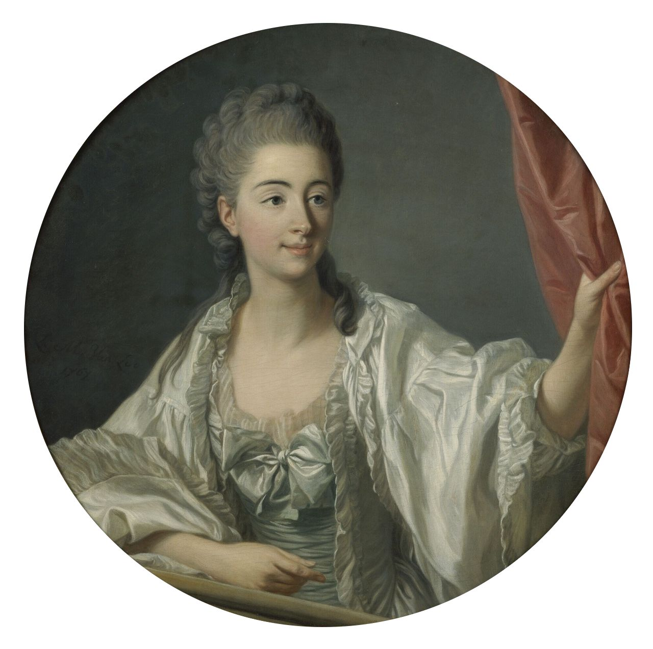 Portrait of Laure Auguste de Fitzjames (1744-1814), wife of Philippe Gabriel de Hénin-Liétard, Prince de Chimay (1736-1804)